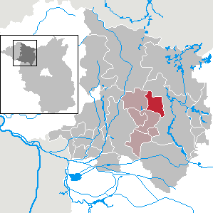 Storbeck-Frankendorf in Brandenburg (Country) - District Ostprignitz-Ruppin